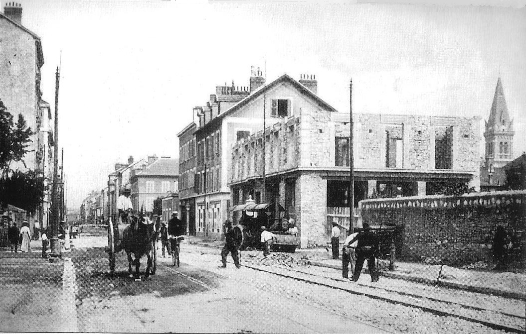 Construction de l'immeuble du 103 cours Berriat à Grenoble en 1895.